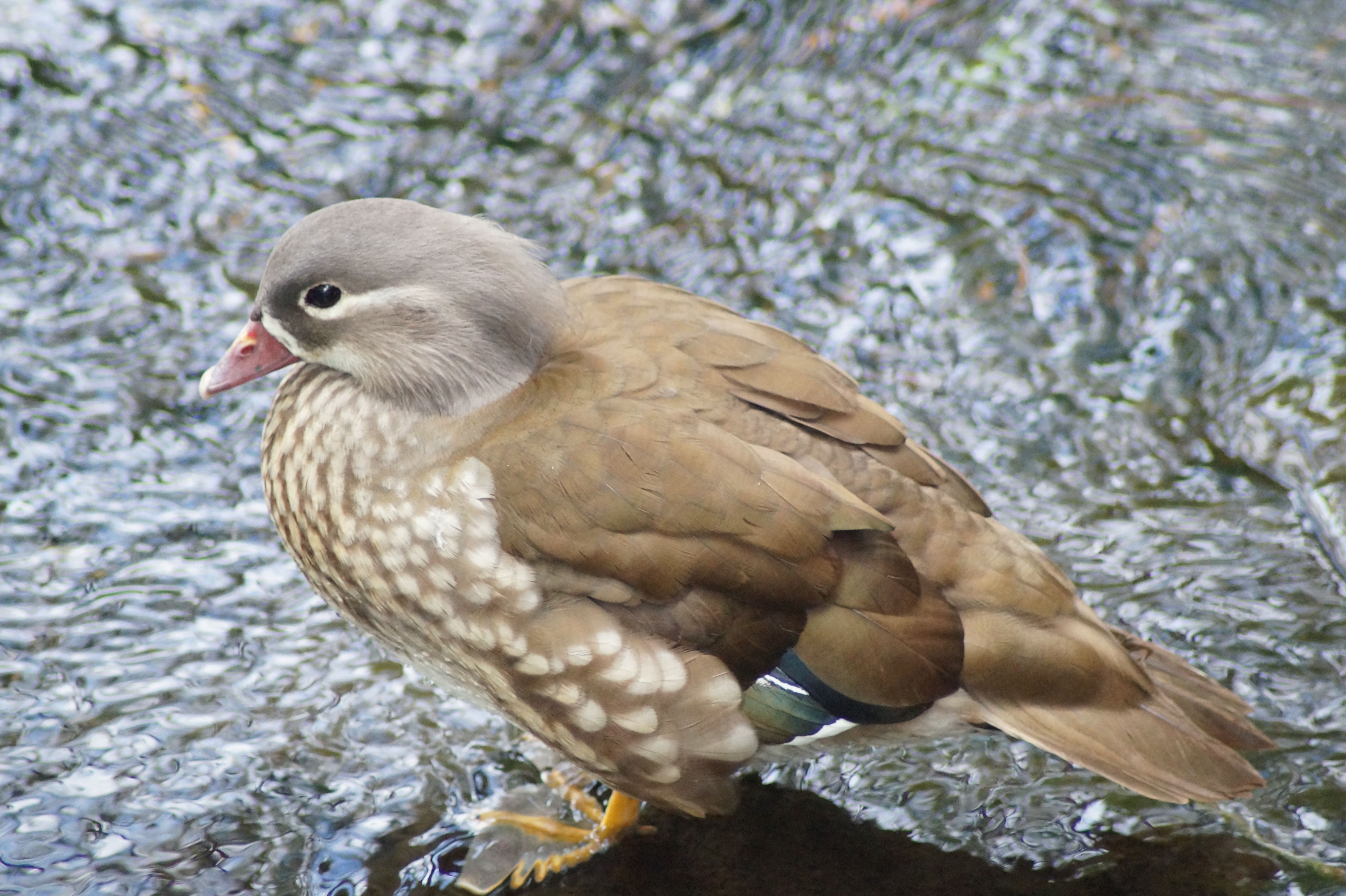 Aix galericulata, Male, eclipse plumage